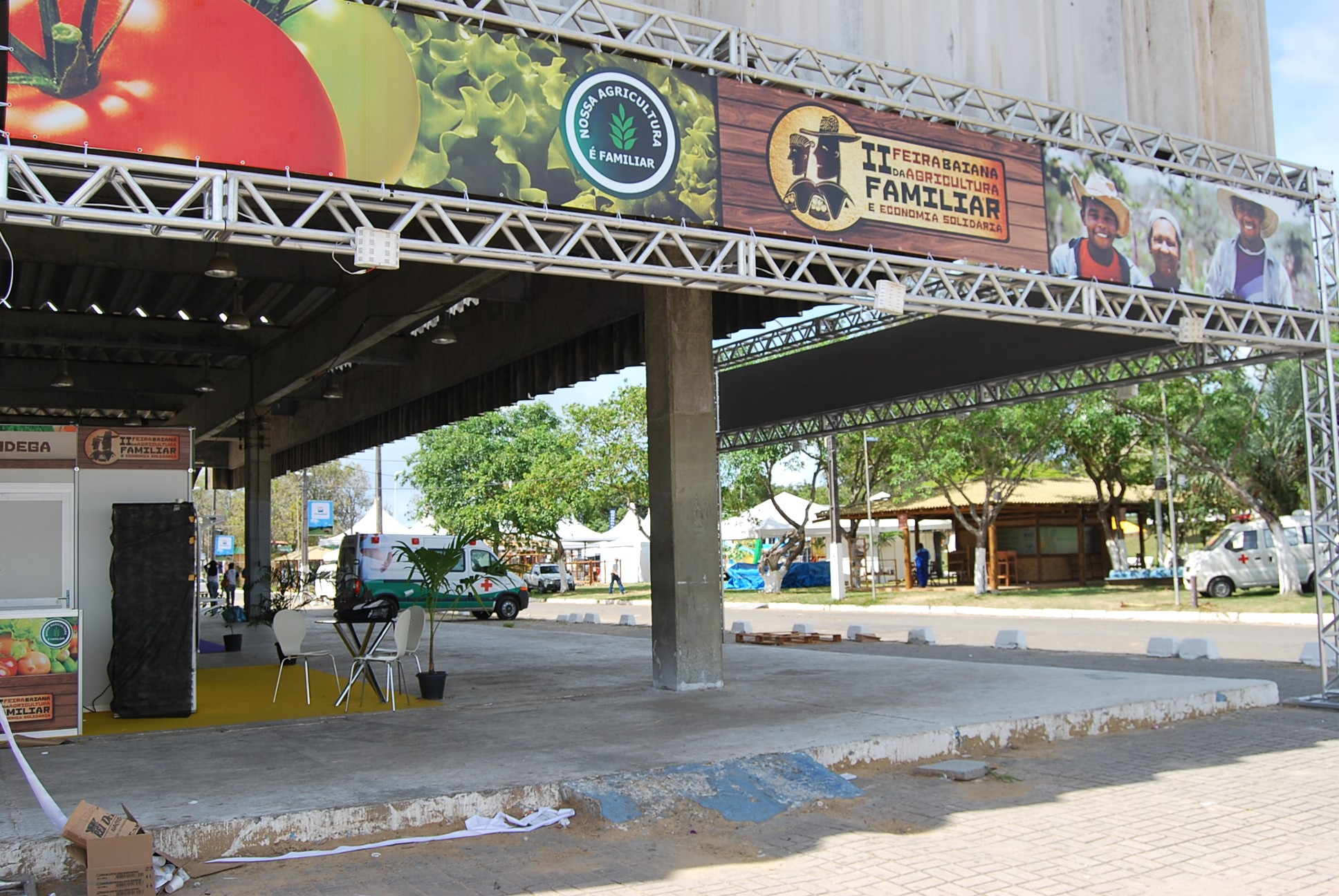 "A importância da Mulher Rural para Construção de uma Sociedade Sustentável" foi o tema de um debate nesta segunda, 28, na Feira Baiana da Agricultura Familiar e Economia Solidária, que acontece esta semana durante a Fenagro, no Parque de Exposições em Salvador. Pescadoras, quilombolas, indígenas, trabalhadoras rurais e comunidades de fundo de pasto se reuniram para debater a participação feminina especialmente na produção de alimentos e contribuição para o desenvolvimento local de forma sustentável. A deputada estadual Neusa Cadore (PT) participou do encontro onde relatou os avanços legislativos na Bahia, que visam garantir mais participação da agricultura familiar no desenvolvimento do Estado. Neusa citou duas leis apresentadas pelo Governador Wagner relatadas por ela. A primeira foi a Lei do Cooperativismo aprovada na Assembleia, sancionada e regulamentada pelo Governador e depois a Lei da Economia Solidária, que encontra-se pronta para votação em plenário. A secretária de Políticas para as Mulheres, Vera Lúcia Barbosa, também participou da abertura do encontro e parabenizou as mulheres camponesas por continuarem na luta e por serem responsáveis por fazer das pequenas propriedades grandes produtoras de alimentos com diversidade e sustentabilidade ambiental. Estão no evento mulheres representantes de várias organizações como Ascoob, Unicafes, Ser do Sertão, Rede de Produtoras, Associação de Mulheres de Pintadas, dentre outras.